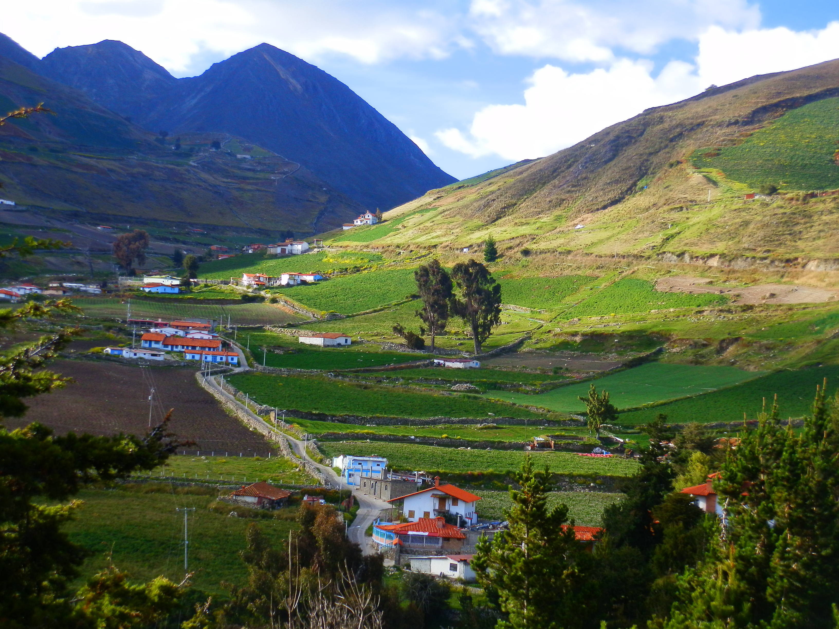 Los Andes venezolanos